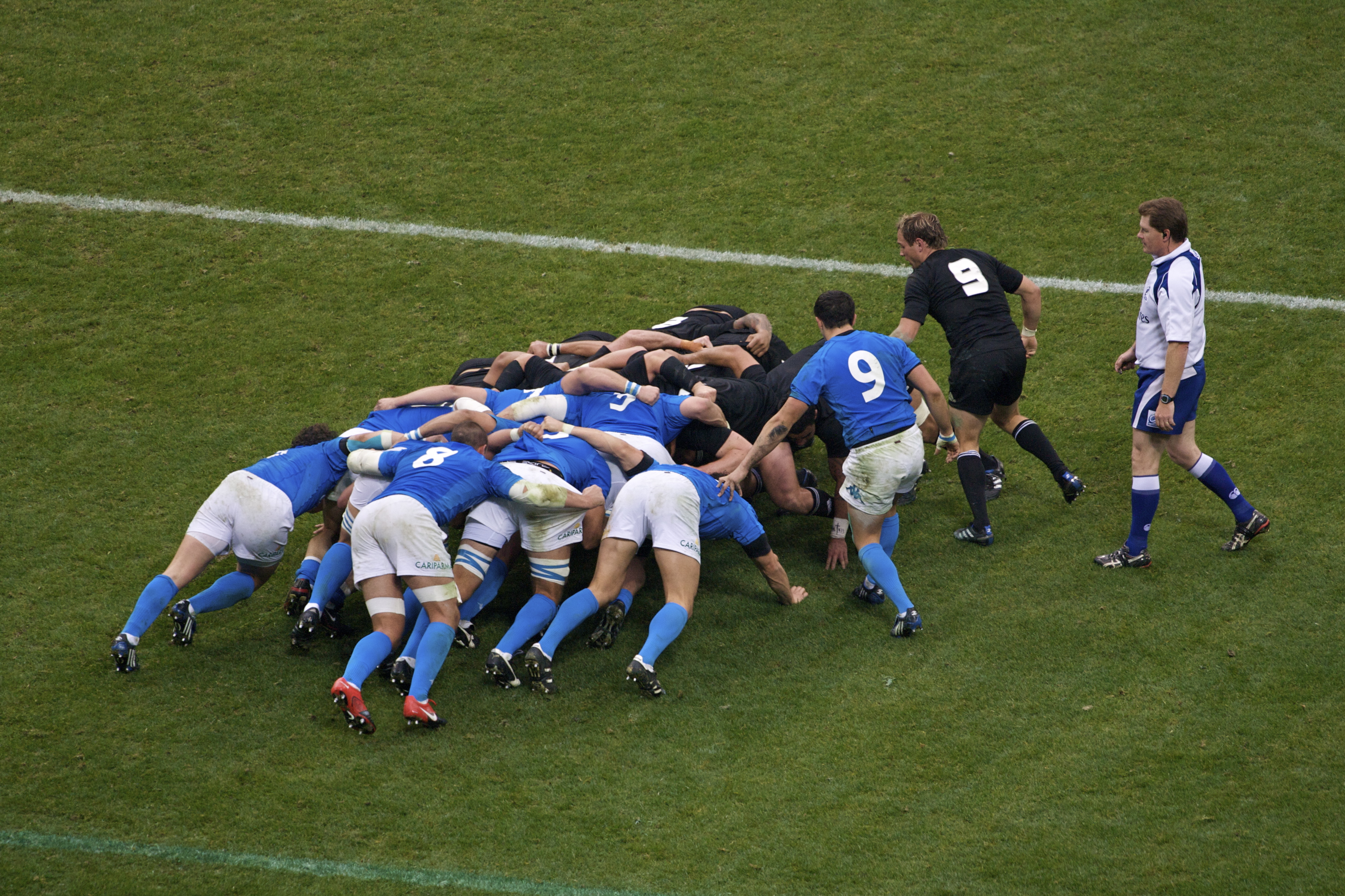 Mêlée en rugby à XV entre l'Italie et la Nouvelle-Zélande en novembre 2009 à San Siro.